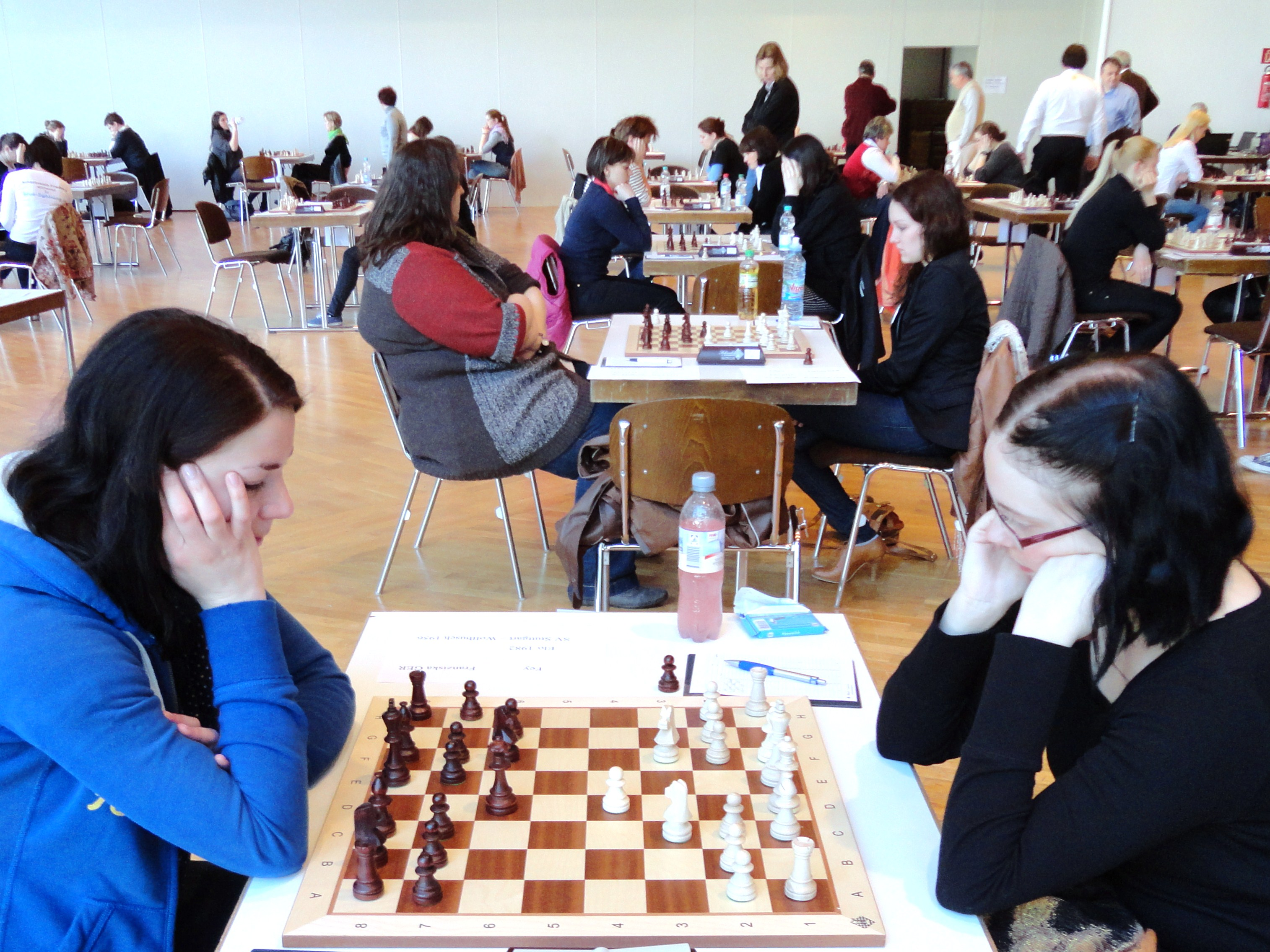 Franziska Fey und Tanja Butschek, Finalrunden der Schachbundesliga der Frauen, Saison 2011/12 in Gladenbach.